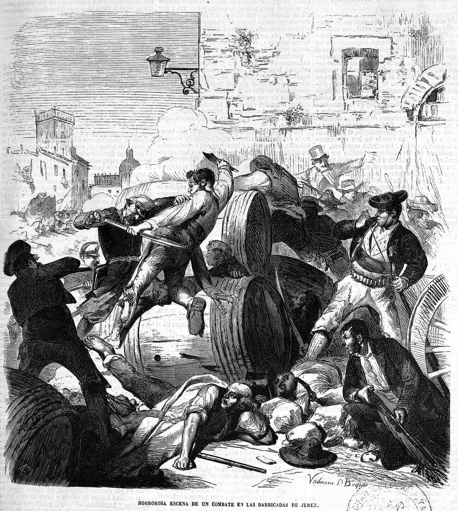 «Horrorosa escena de un combate en las barricadas de Jerez», marzo de 1869, en la revista española El Museo Universal.